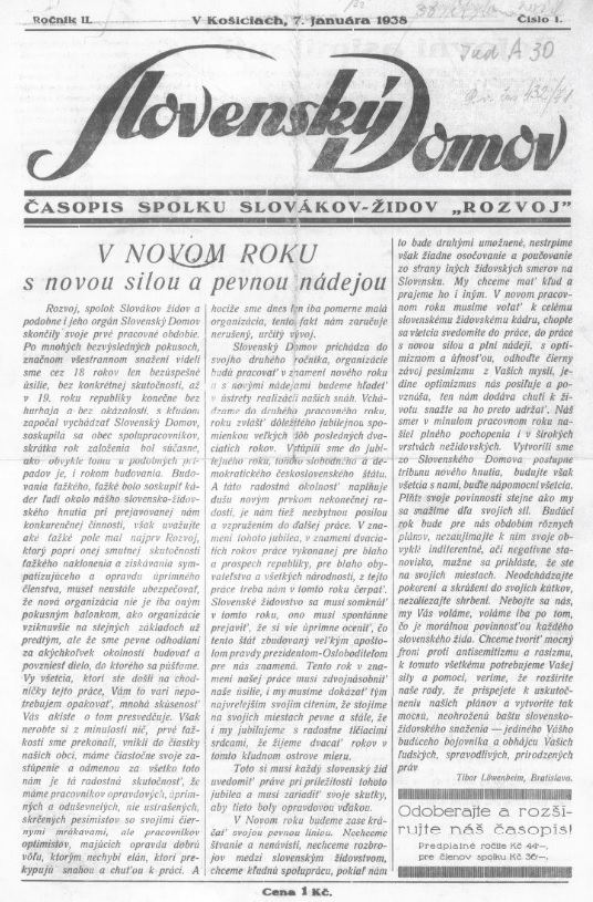 Titulný list periodika Slovenský domov vydávaného na Slovensku pred druhou svetovou vojnou.